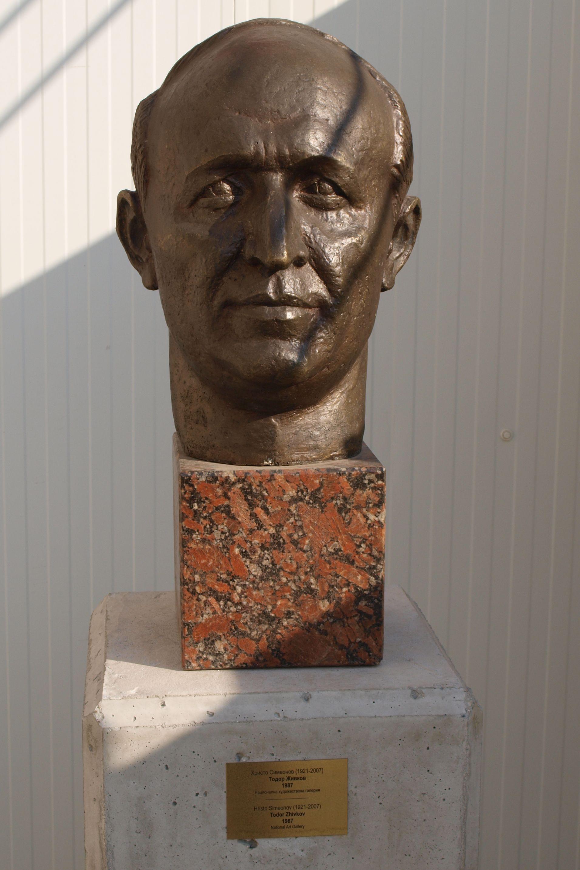 Скулптури в парка на Музея на социалистическото изкуство в София - Тодор Живков.